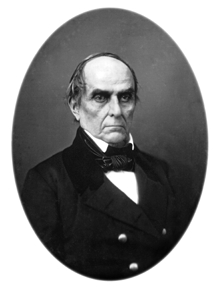 Daniel Webster (1782-1852), US-american politician ca. 1849 / US-amerikanischer Politiker ca. 1849